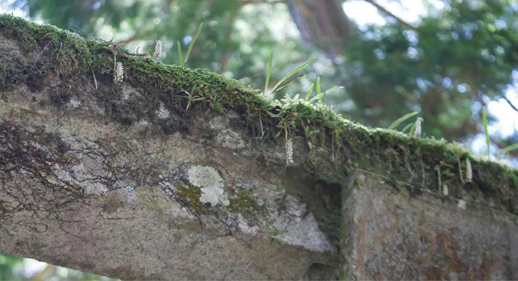 2018/08/15 和歌山県：Wakayama Pref. Japan